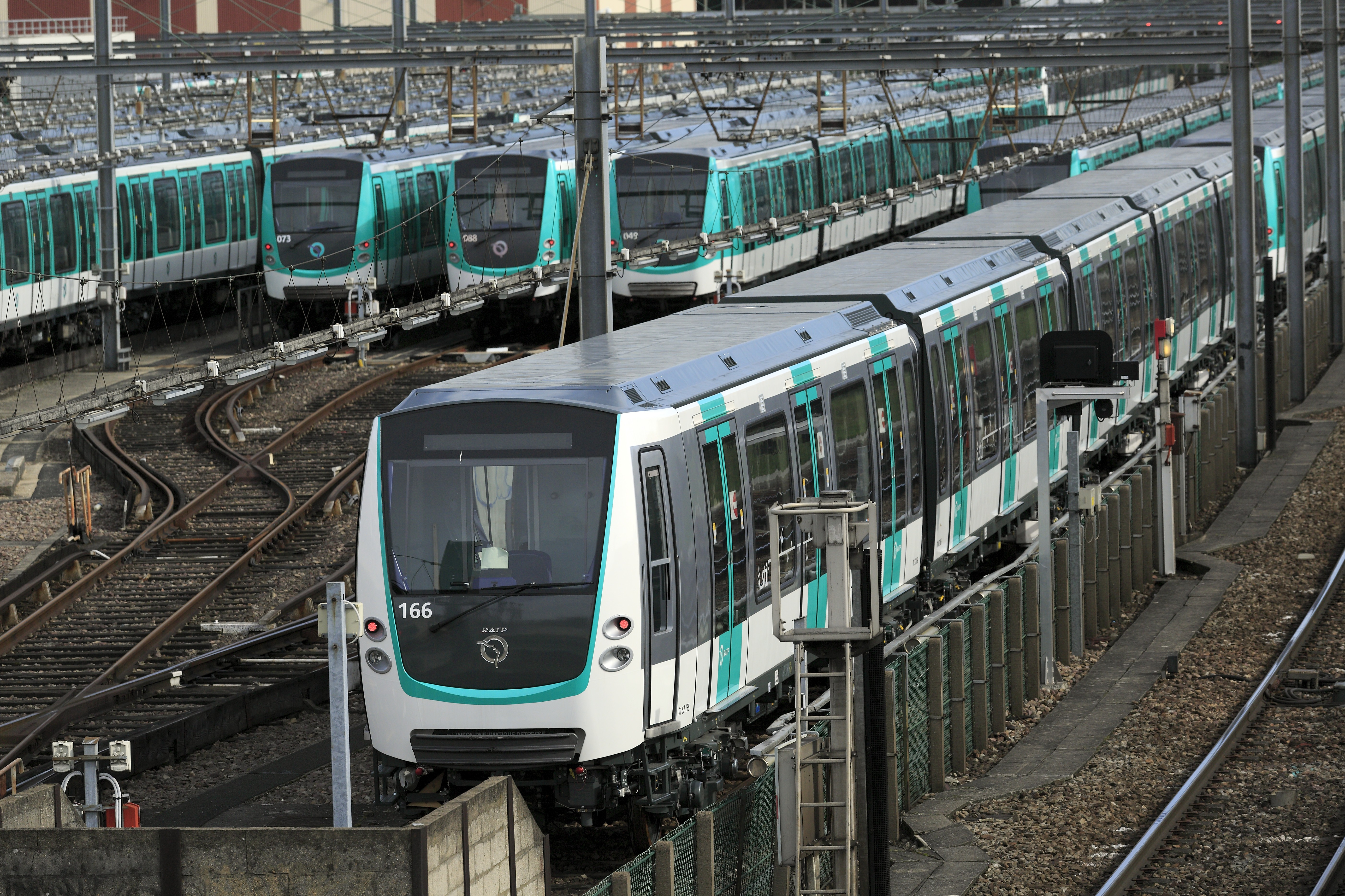 Zug der Reihe MF 01 in der Freiabstellgruppe des Bw mit dem neuen Anstrich des STIF. Die Einheit wurde neu angeliefert und noch nicht eingesetzt. Auch die Drehgestelle weisen keine Verschmutzungsspuren auf. An den Türen kleben Sperrzettel, an der Frontscheibe ein Weiterer.